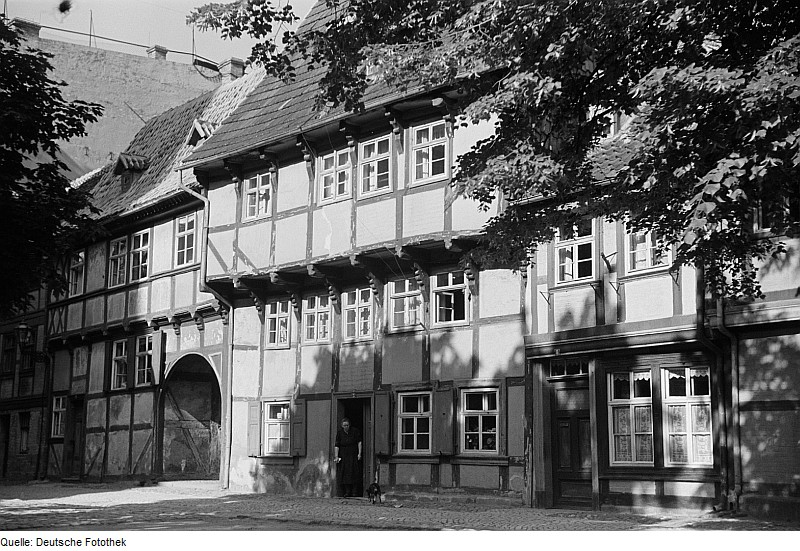 Original image description from the Deutsche Fotothek Ansicht Fachwerkhäuser in der Hohen Straße